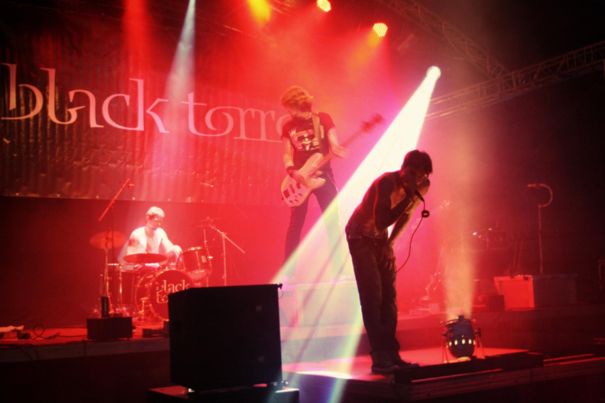 black torro live beim Vinstedt Open Air 2011